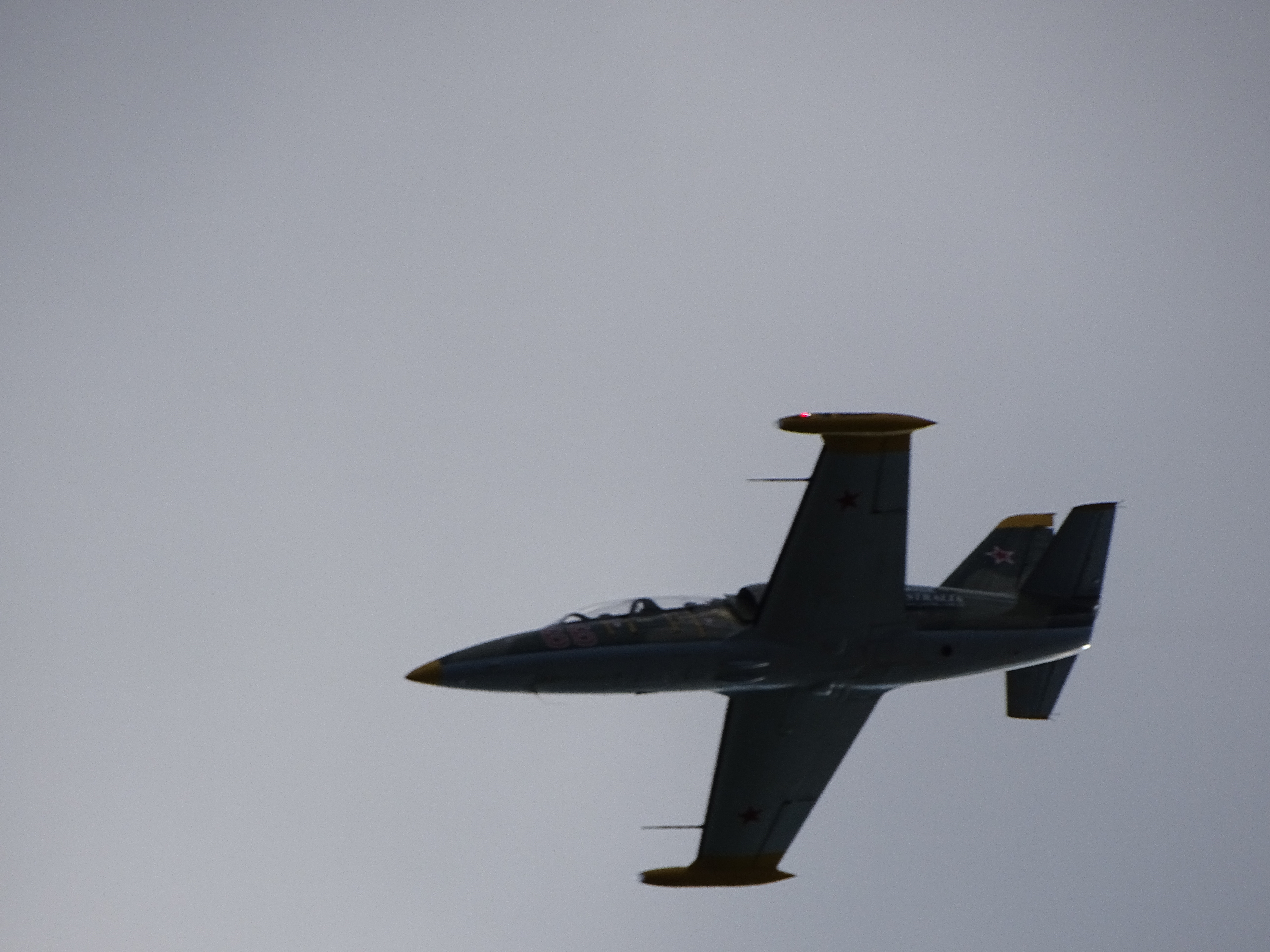 Aero L-39 Albatross